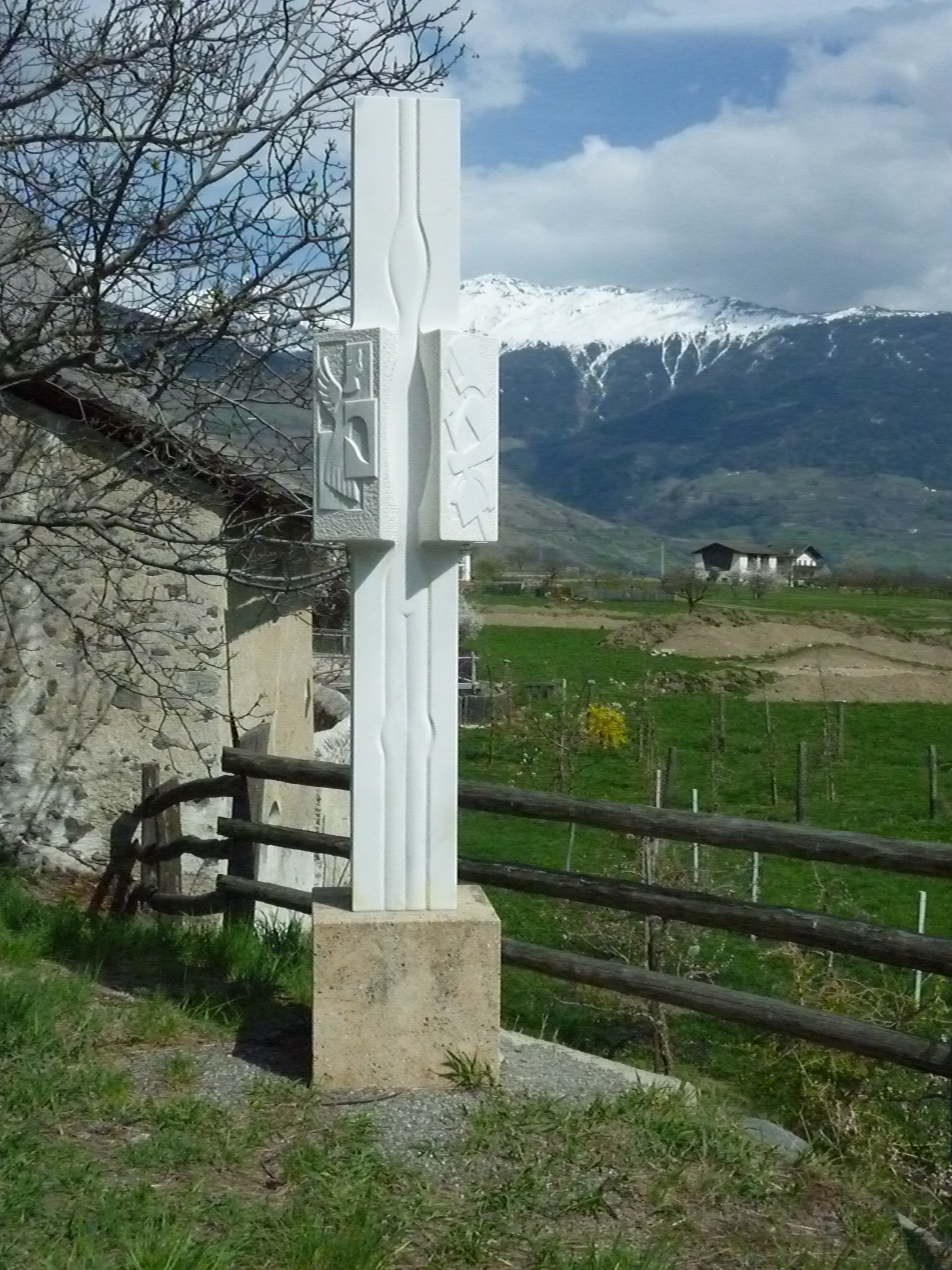 Schlacht an der Calven: Gedenkstein